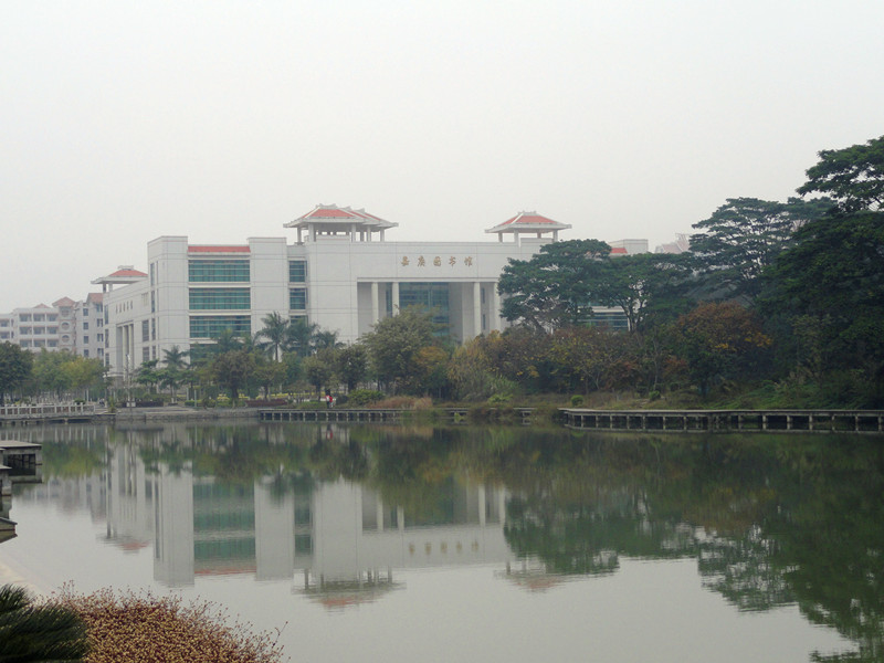 2013年1月23日拍摄的嘉庚图书馆